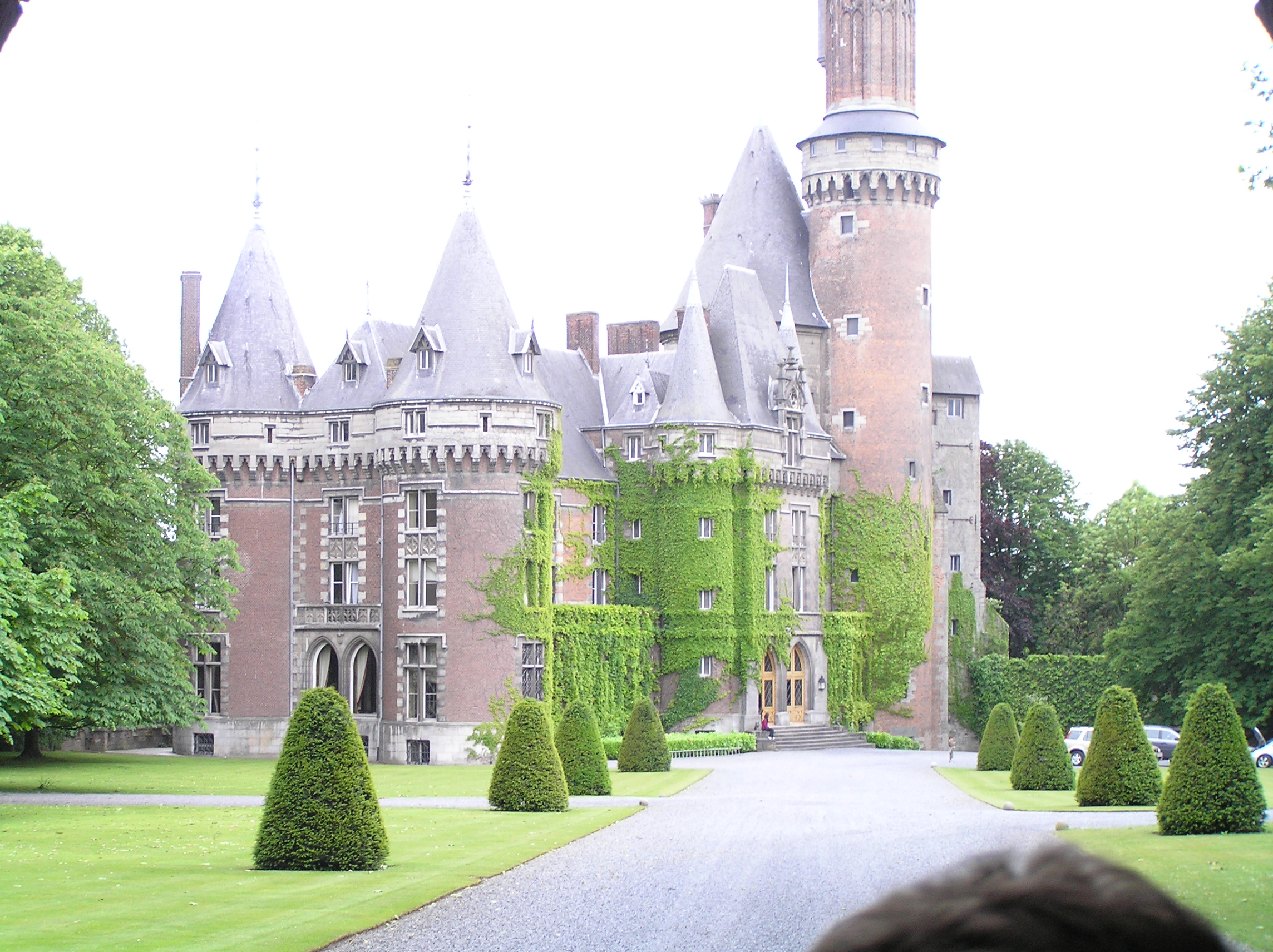 Bâtiments centraux du château d'Antoing.